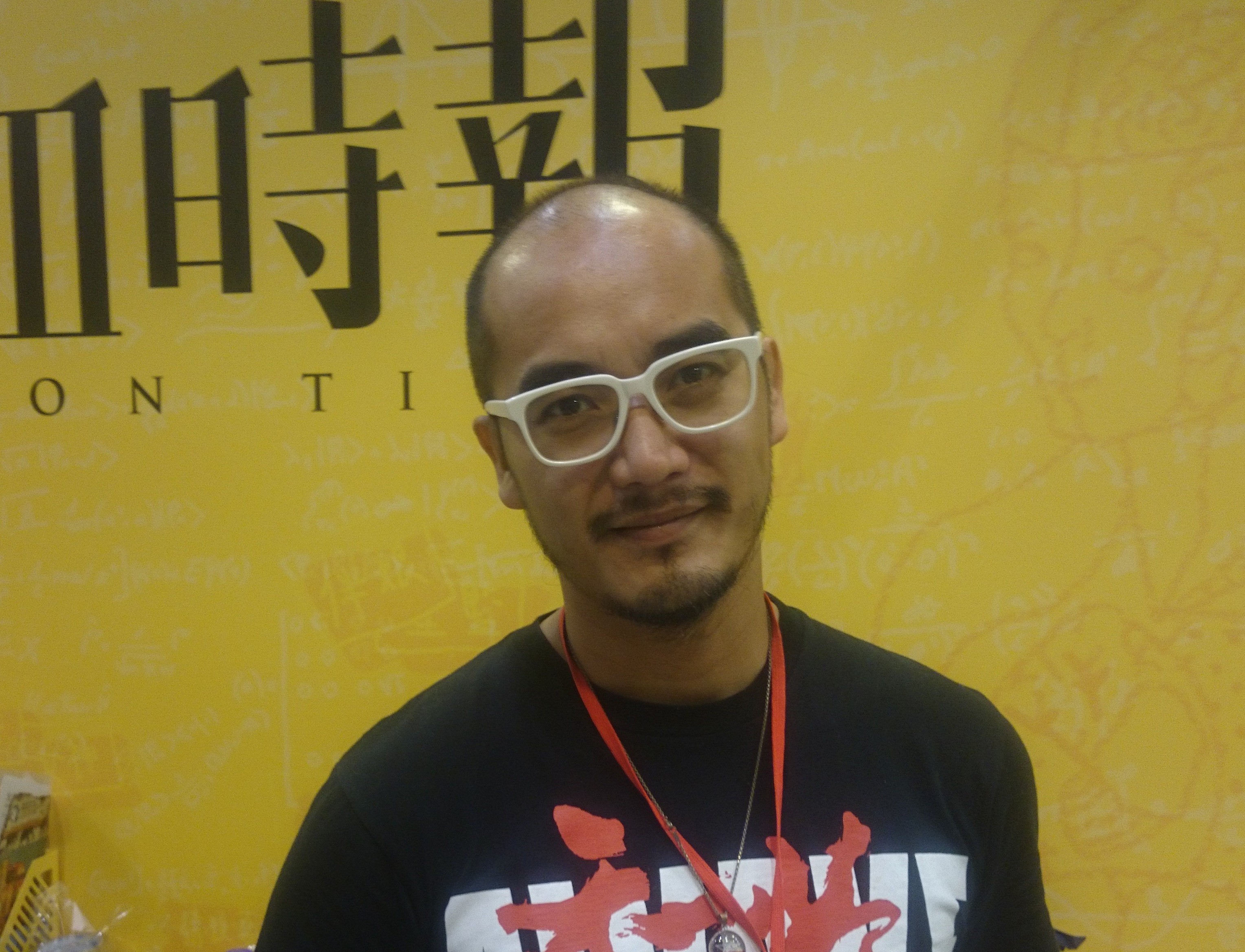 粵語: 黃洋達喺2017年7月24號下畫喺《熱血時報》個書展攤位度。